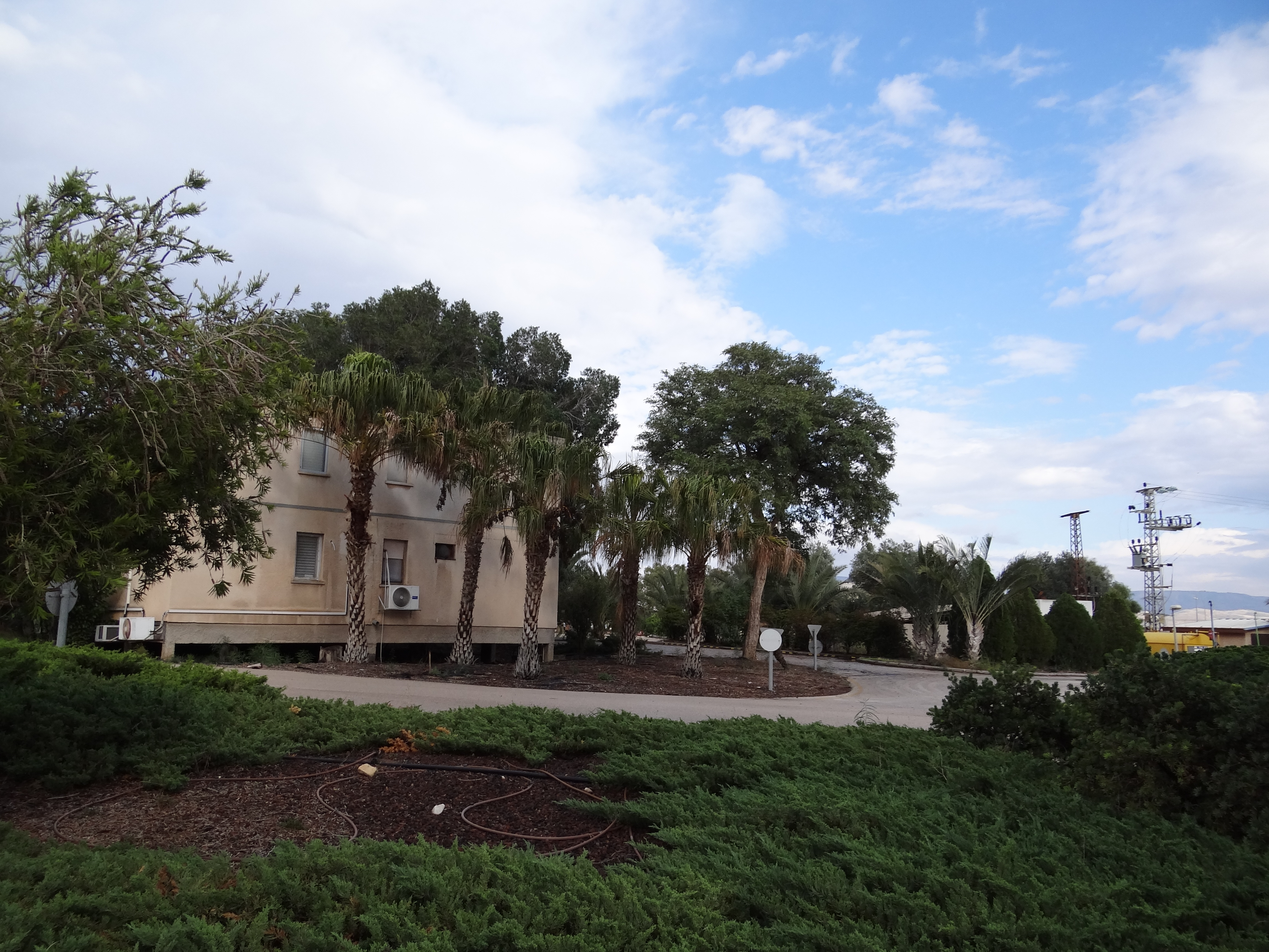 Gesher is a kibbutz in the Beit She'an Valley in northeastern Israel. Founded in 1939 by immigrants from Germany. גשר הוא קיבוץ השייך לתנועה הקיבוצית (תק"ם). מיקומו בעמק הירדן, מדרום לכנרת כ-10 ק"מ דרומית לצומת צמח, סמוך לכביש 90 (כביש הבקעה). הקיבוץ נקרא על שמו של גשר נהריים הסמוך לו.